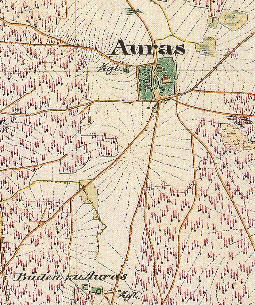 Auras, Gemeindesteil von Schorbus, Ortsteil der Stadt Drebkau, Landkreis Spree-Neiße, Brandenburg, Ausschnitt aus dem Urmesstischblatt 4351 Drebkau von 1846